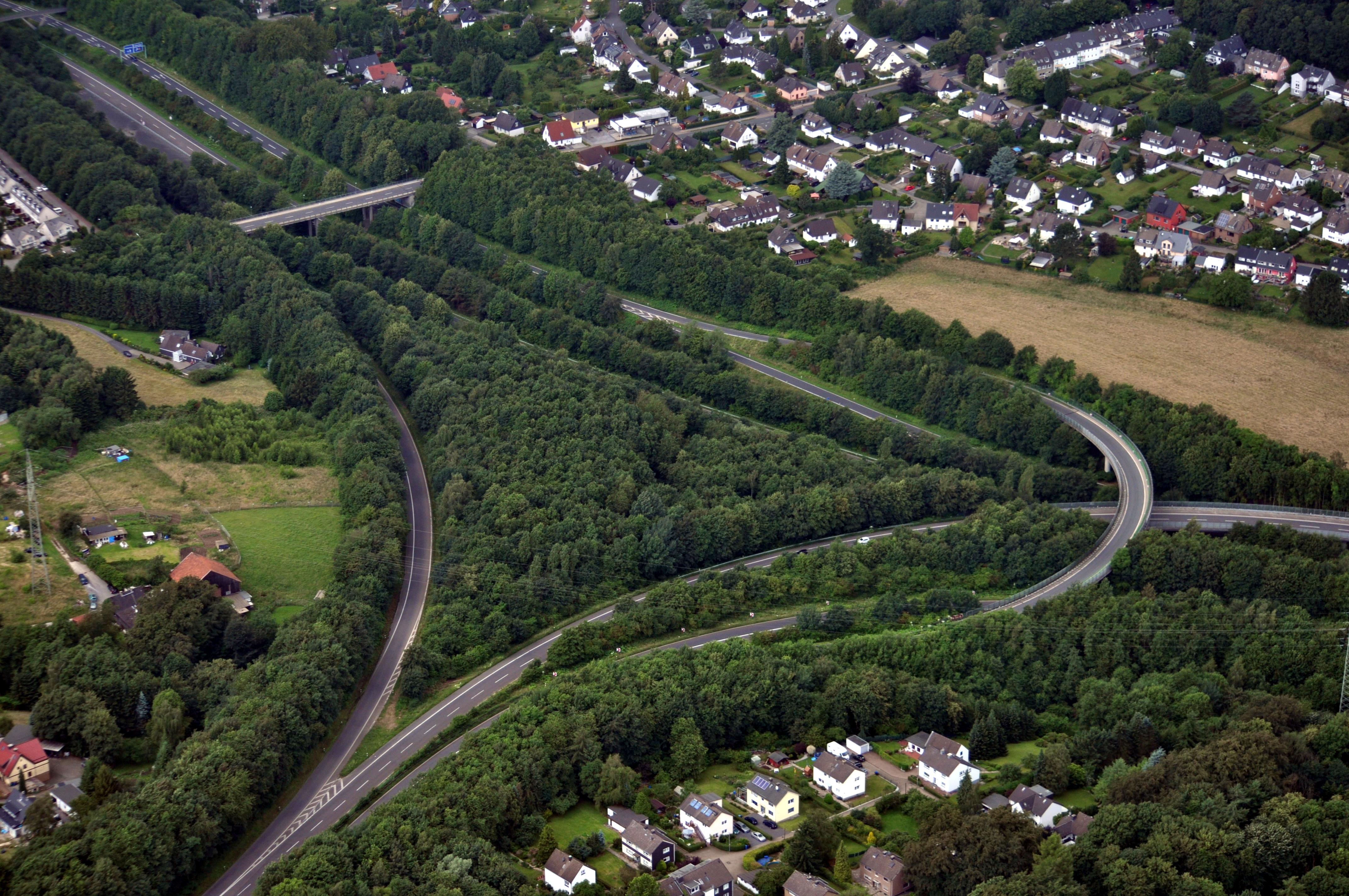 Das Autobahndreick Velber-Nord (A44 trifft A535)